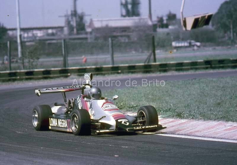 Rafael Verna (Berta-Renault), Buenos Aires, F2 Codasur 1986.